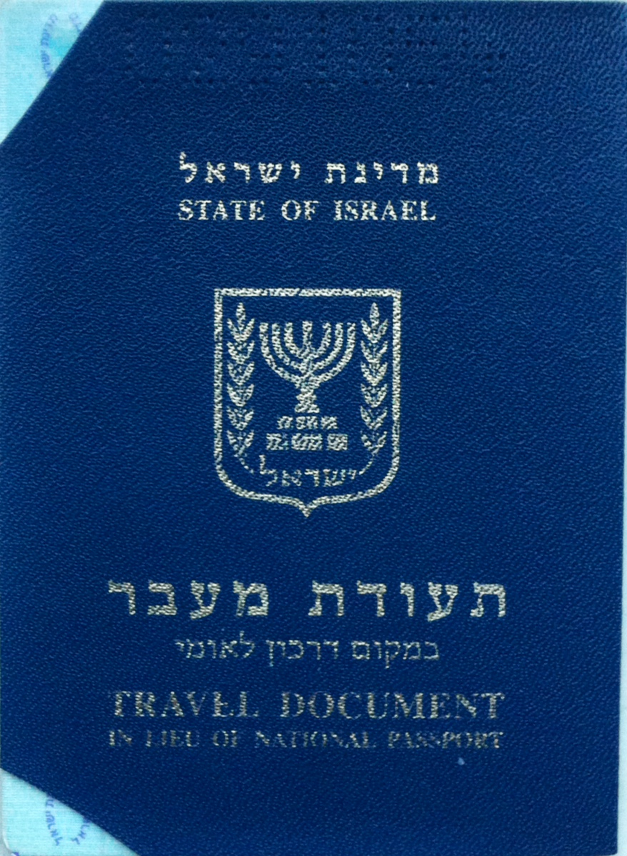 Обложка "Проездного документа взамен национального паспорта" (ивр. Теудат Ма'авар), Израиль.